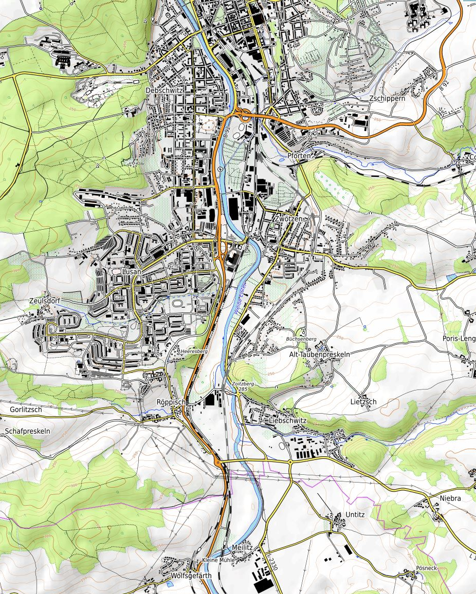 Karte der Bahnstrecken Bahnstrecke Leipzig–Probstzella, Wolfsgefährt Abzweig–Weischlitz und Gößnitz–Gera im Süden von Gera (Ausschnitt)